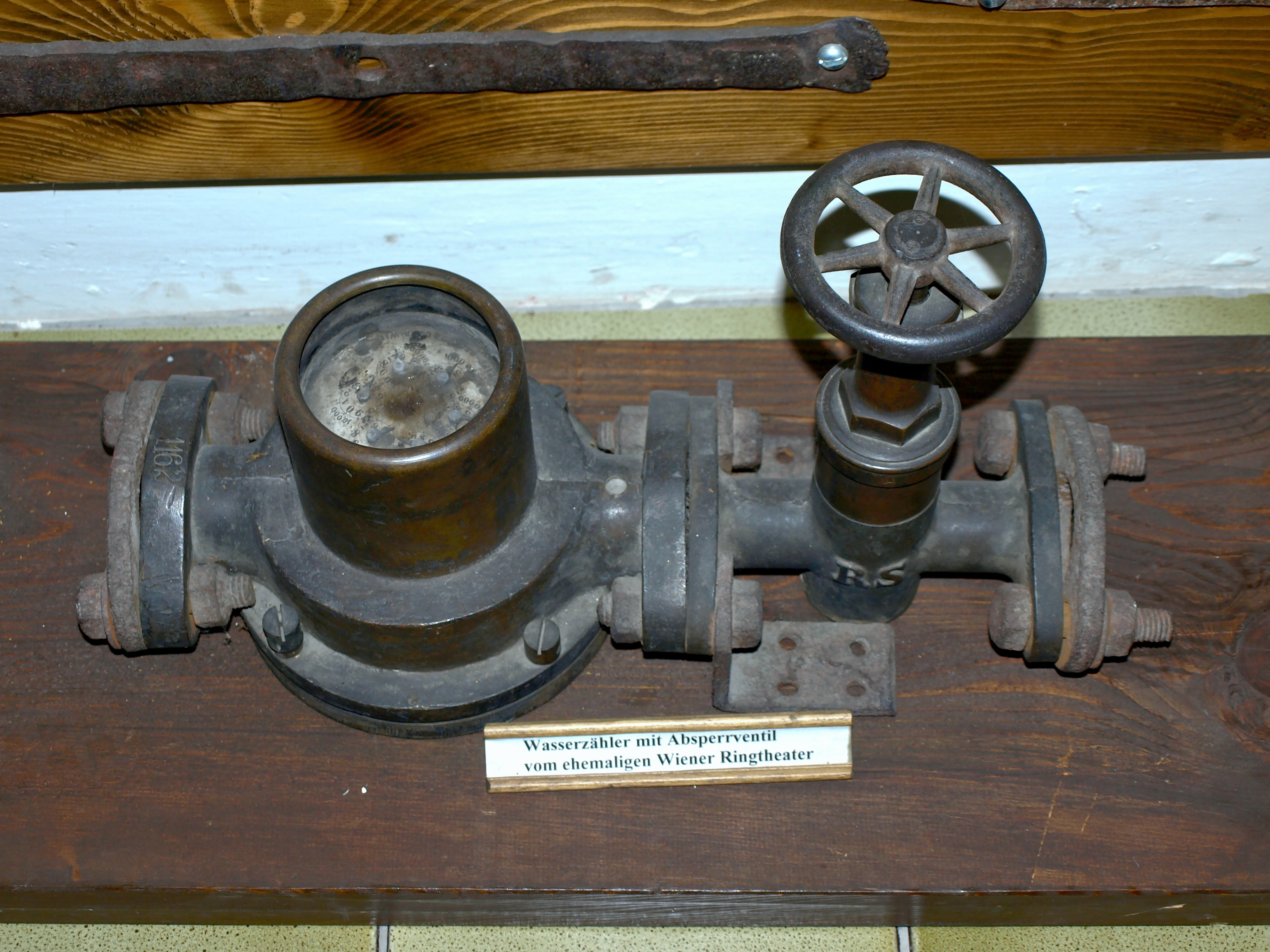 Museum, (Kino, Fahrerhof, Hauptgebäude, Stöckl)